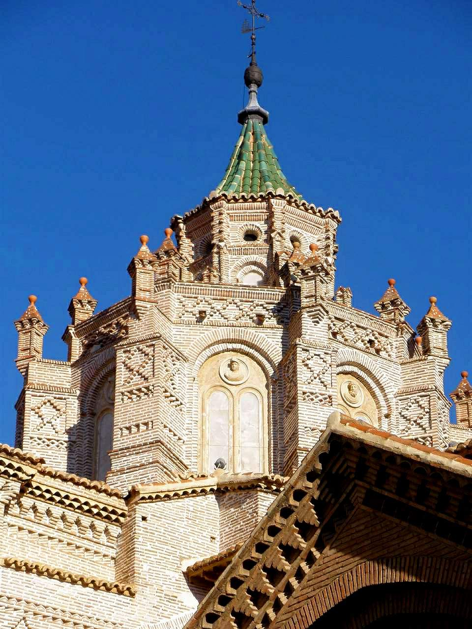 Catedral de Santa María de Mediavilla, Teruel. Cimborrio mudéjar